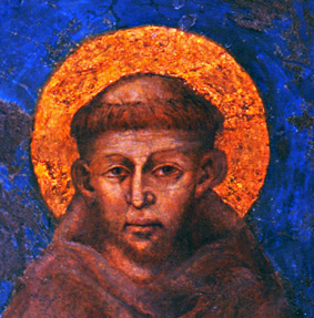 Fragment, Vergine in Maestà, con Bambino, quattro angeli e san Francesco. Basilica inferiore di San Francesco (Assisi - Italy)